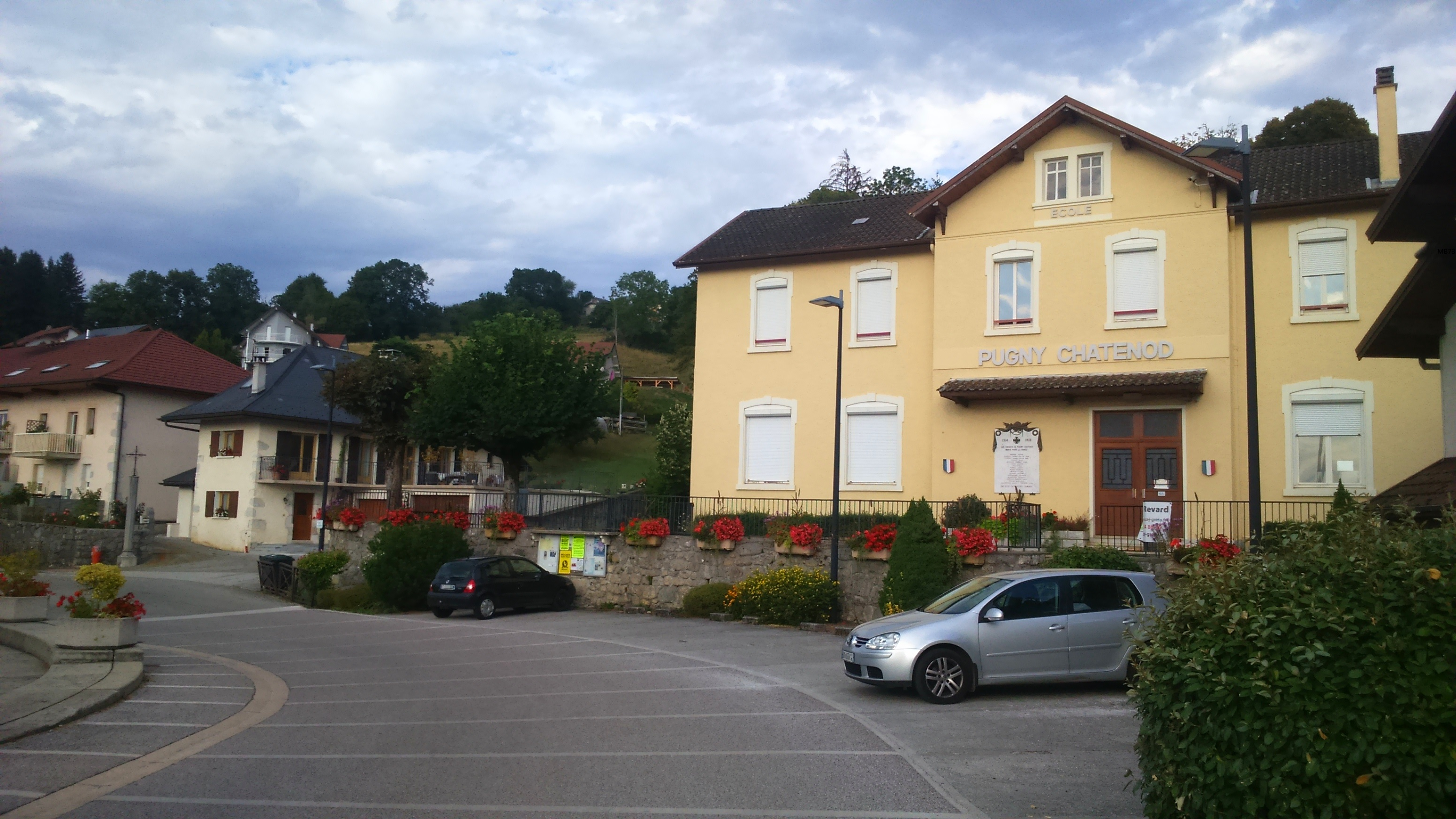 Vue sur l'hôtel de ville et la place centrale de Pugny-Chatenod (Savoie).